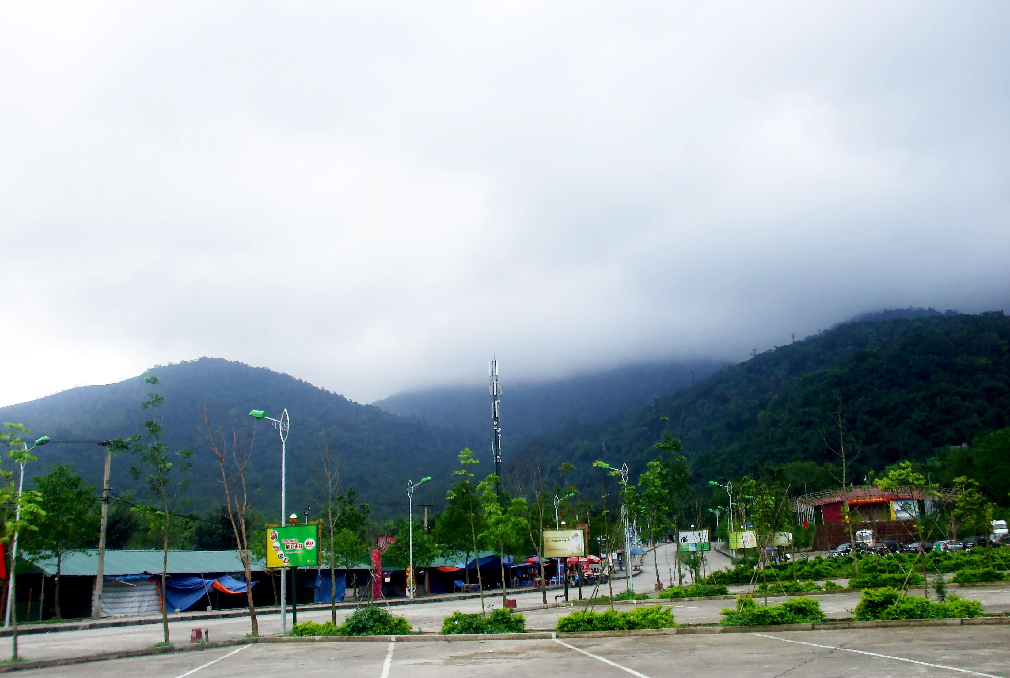 Toàn cảnh núi Yên Tử (Quảng Ninh, Việt Nam).